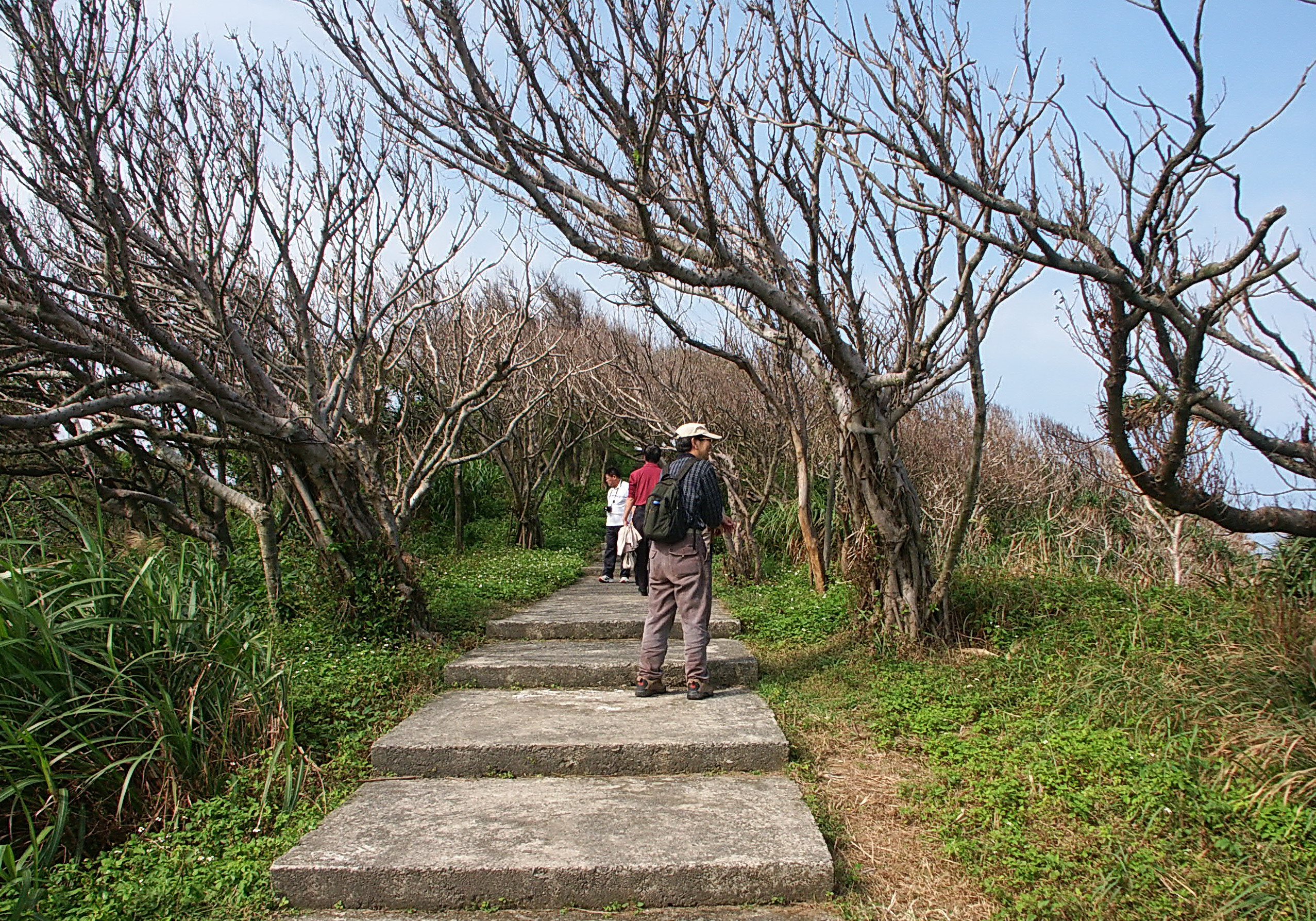 獅頭山公園